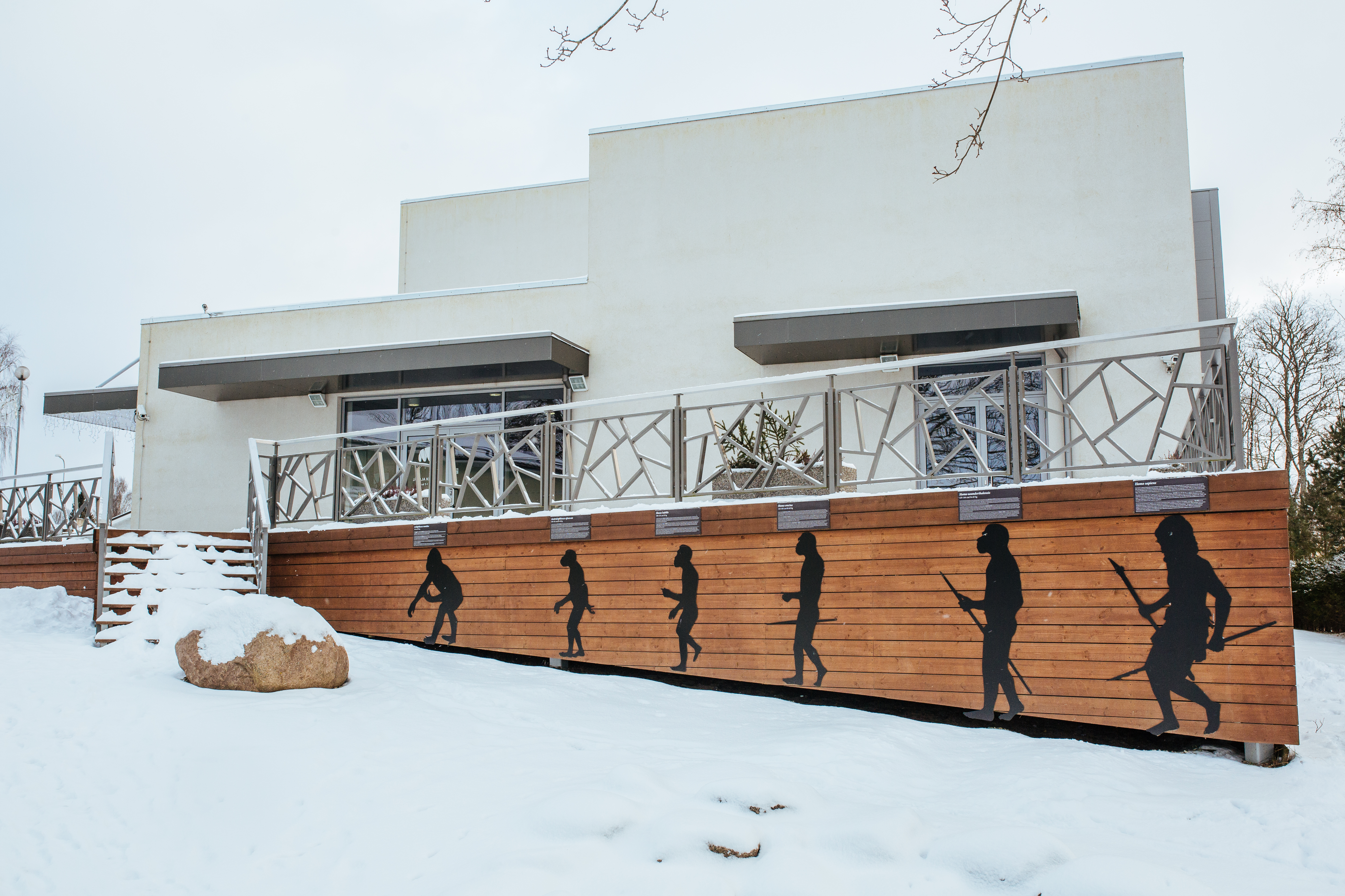 Ice Age Centre in Äksi, Estonia